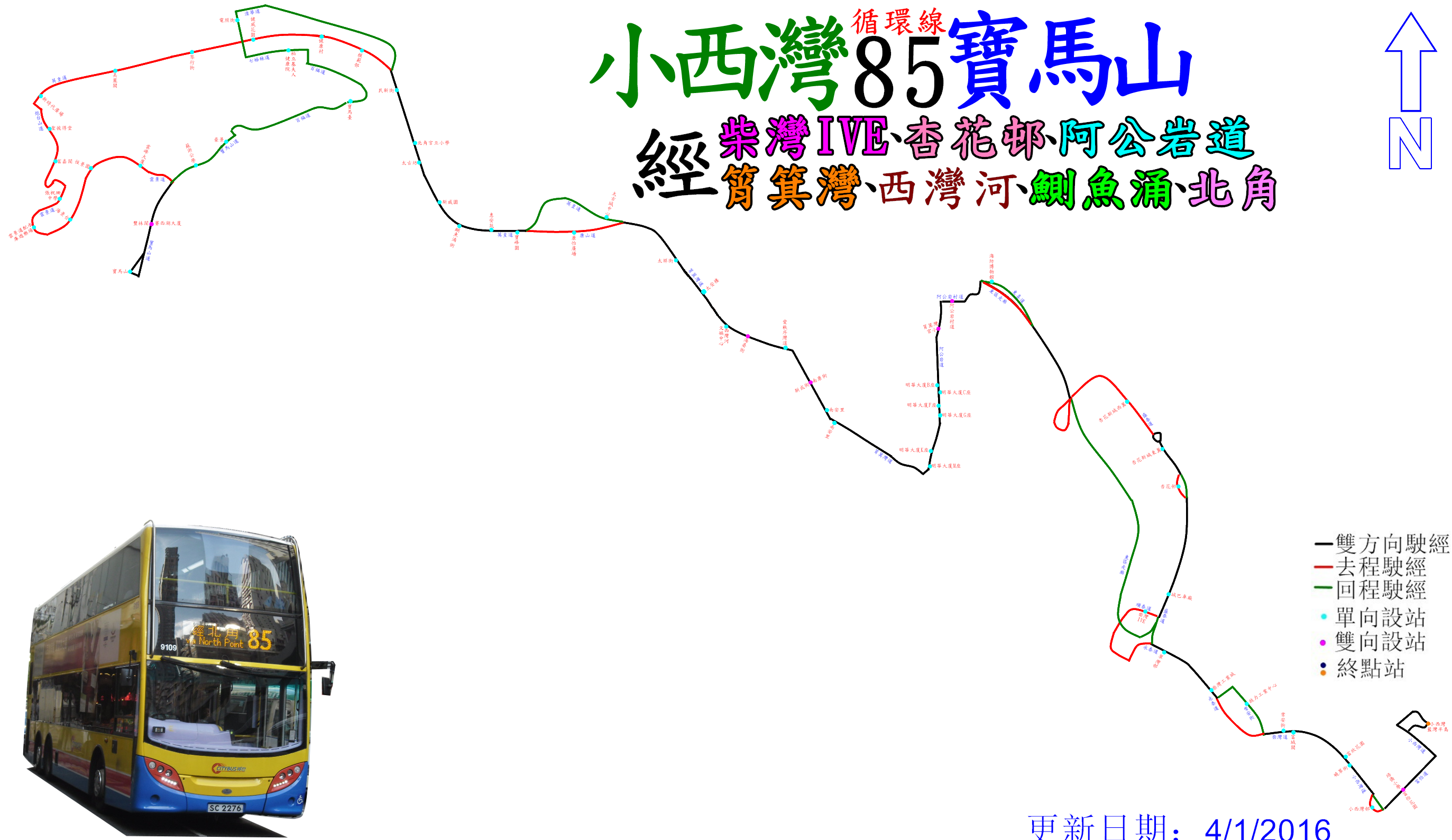 中文（香港）: 城巴85線的走線圖